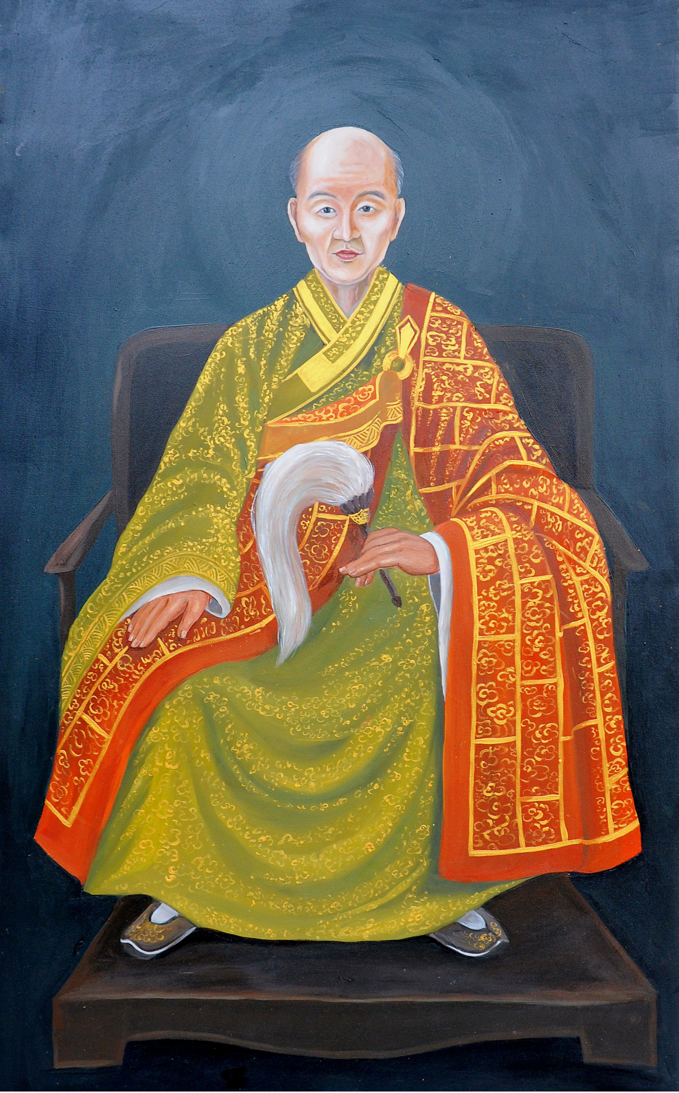 tổ sư minh hải pháp bảo